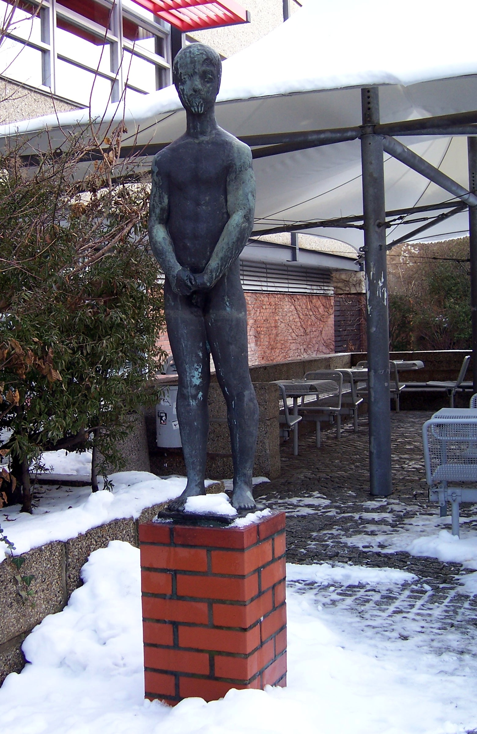 Charlotte Sommer-Landgraf - Stehender Knabe, TU Dresden